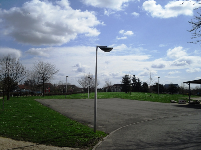 Le parc des Champs Foux de Chilly-Mazarin (91)